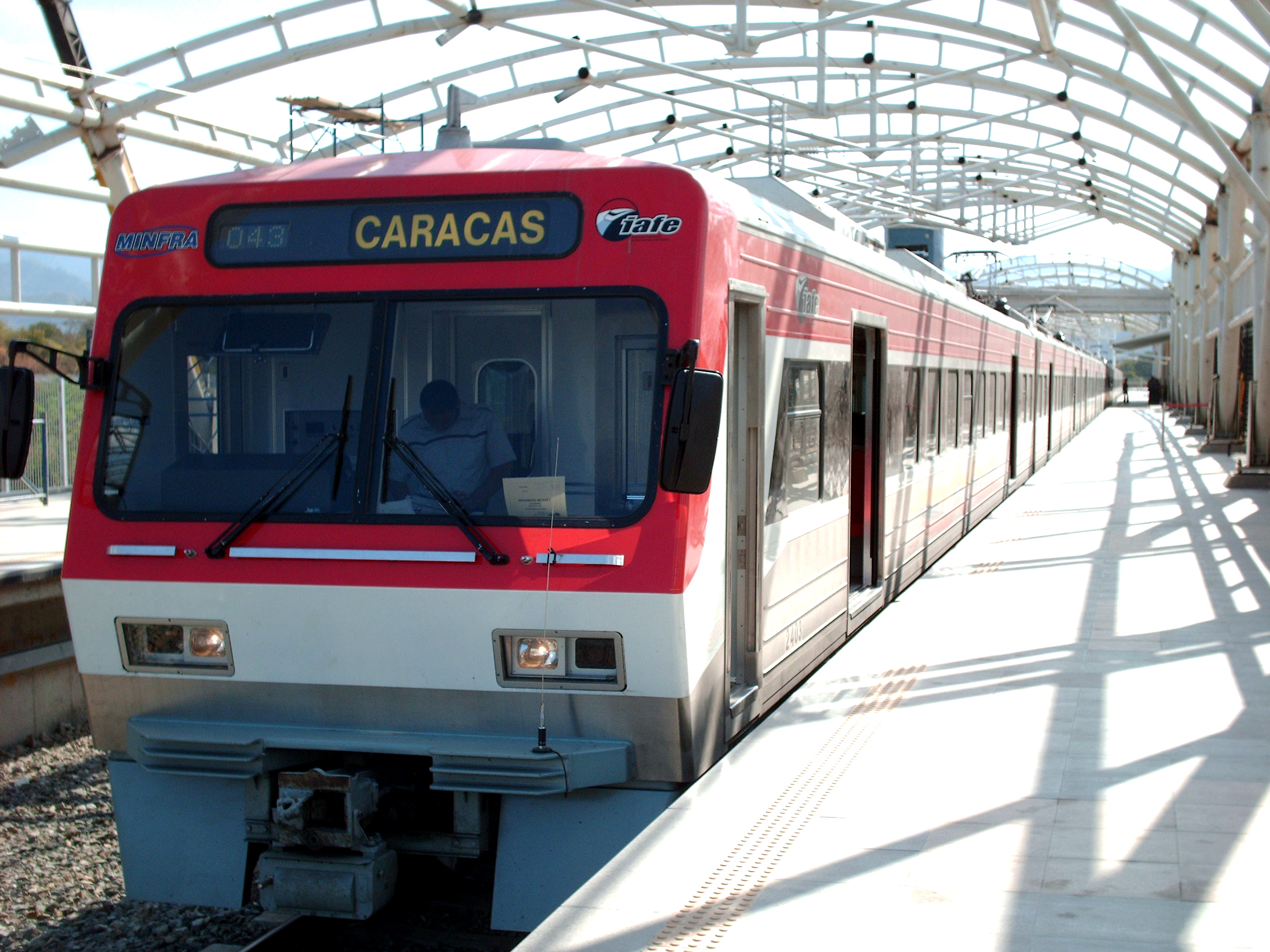 Tren de tecnología japonesa empleado en el tramo Caracas Tuy Medio